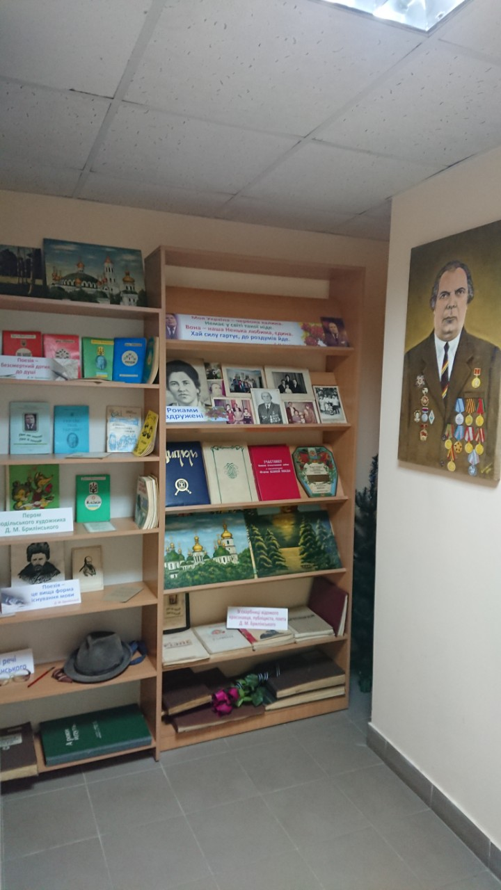 Музейна кімната Дмитра Михайловича Брилінського де зберігаються друковані та рукописні видання, а також особисті речі подільського письменника.